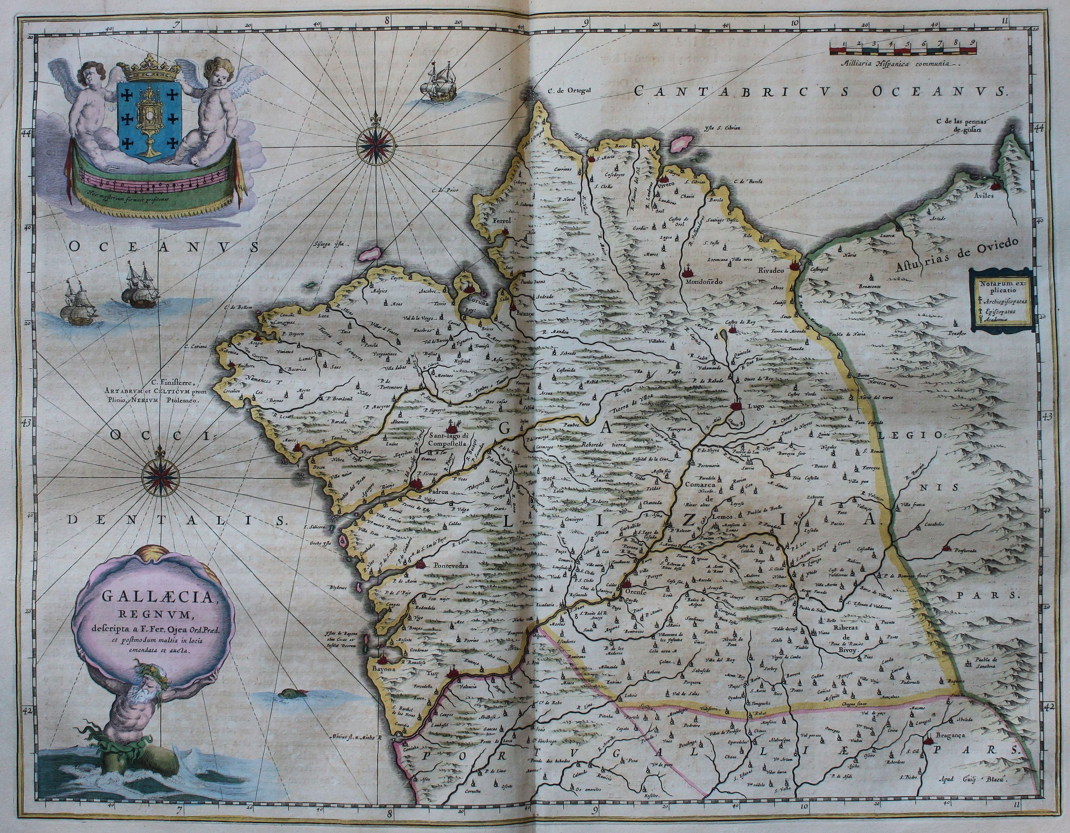 Descripción bibliográfica: Geographia Blaviana. - [Amsterdam : Juan Blaeu, 1659] . - [32], VI, 96 p., 34 f., h. 35a, 35b, 35c, 35d, 36-44 f., 34, [2], 36-40, [2], 43-70 [i. e. 75], [1] f., [20] p. de map., [9] f. de map., [4] f. pleg. de map., [2] f. de plan., [2] f. ge grab. : |bil. ; |cFol. marca major (57 cm.) . - En la dedicatoria a Felipe IV: "Presenta ... El Atlas Universal y Cosmographico de los orbes y terrestre ... Juan Blaeu" . - Título tomado del frontispicio. -- Privilegio fechado en 1659. -Errores de pag. - Sign.: 1, *2, **3, ***-****2, a-e2, A-I2, K1, L-Z2, Aa-Dd2, 4 2, Ee-Ff2, A-I2, K1, L2, M1, N-Y2, Z5, Aa-Dd2, Ee1, A-D2, E-F1, G-I2, K-L1, M-O2, P1, Q-Z2, Aa-Bb2, Cc1, Dd3, Ff-Zz2, Aaa-Bbb2, . - Frontispicio grab. col. -- Incluye un total de 49 il. entre map., plan. i grab. Materia: Atlas - Obras anteriores a 1800 Impresor: Blaeu, Joan, 1596-1673, imp. Lugar de impresión: Holanda. Amsterdam Localización: Vea la ilustración en su contexto Visite también la exposición "Cartografía histórica en la Biblioteca de la Universidad de Sevilla"